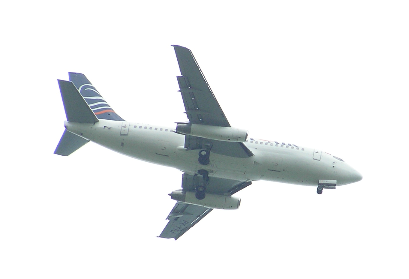 Batavia Air 737-200 about to land at Yogyakarta